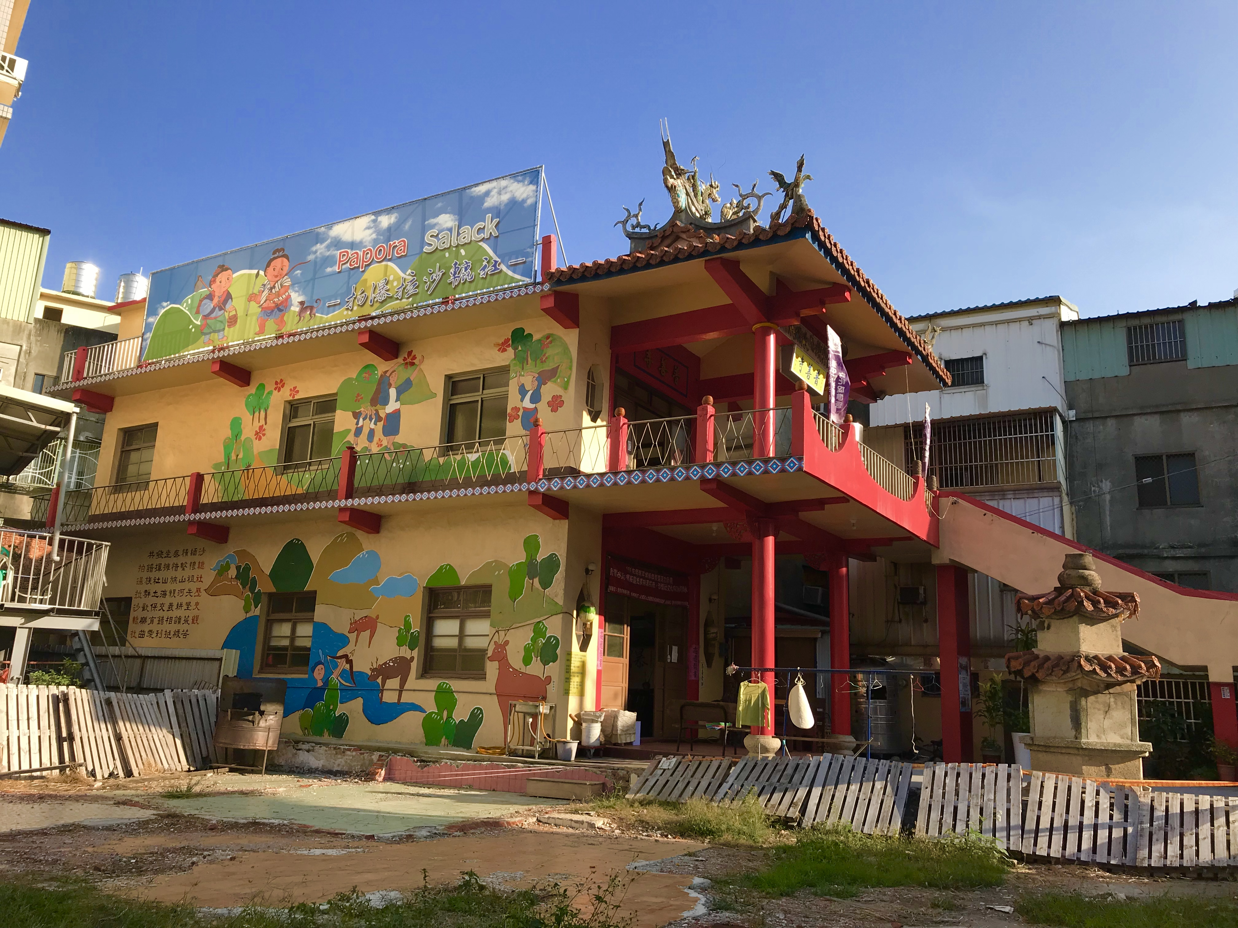 中文（台灣）: 普善寺側面照